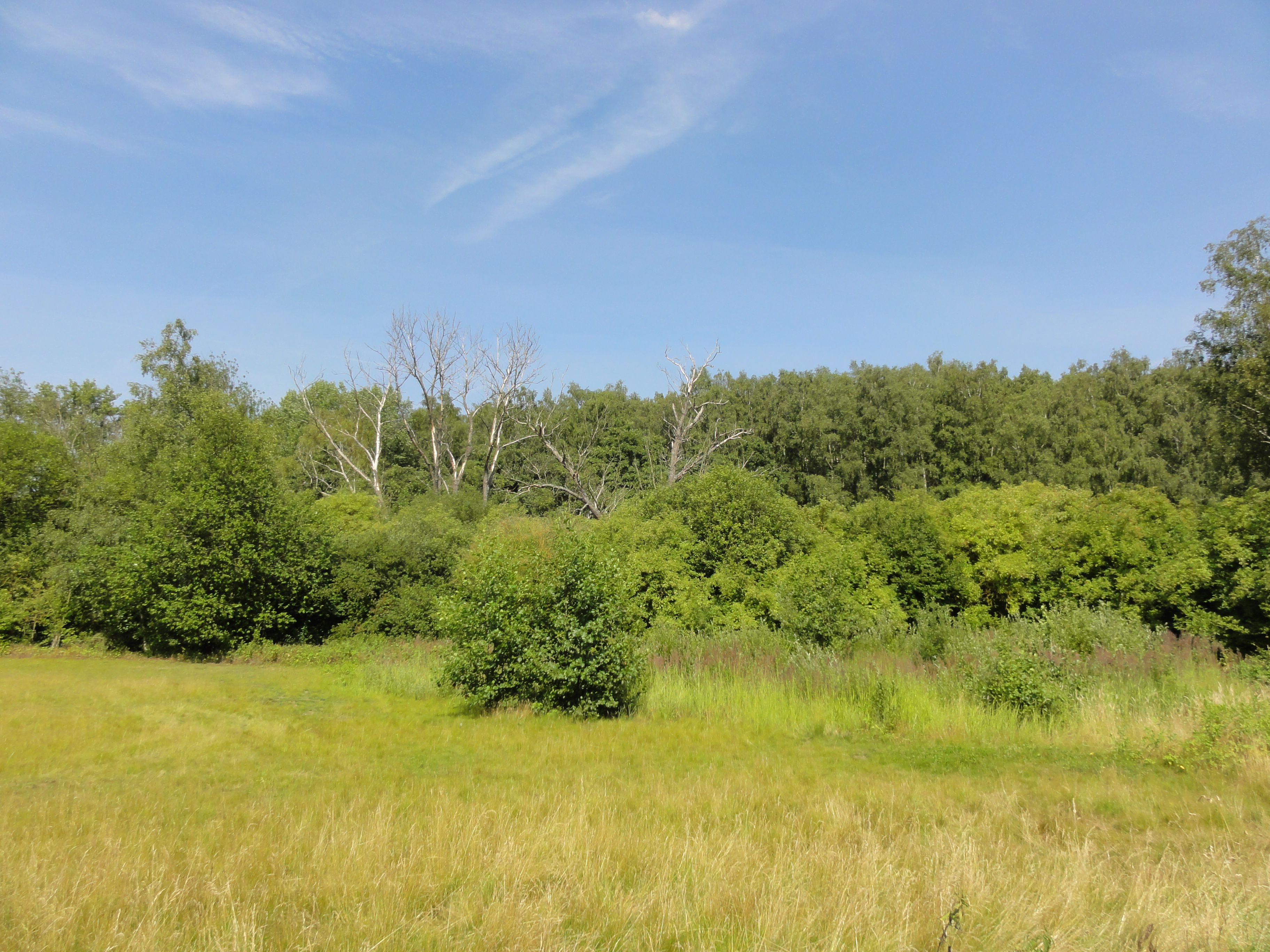 Terril n° 139 dit Paturelles, Fosse n° 1 de la Compagnie des mines de l'Escarpelle, Roost-Warendin, Nord, Nord-Pas-de-Calais, France.